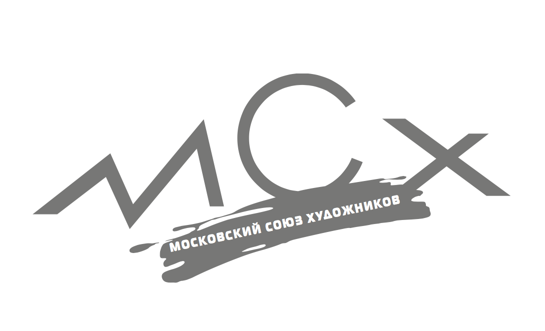 Газета НОВОСТИ МСХ. 2008 г